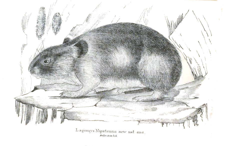 Lagomys nipalensis = Ochotona roylei nepalensis